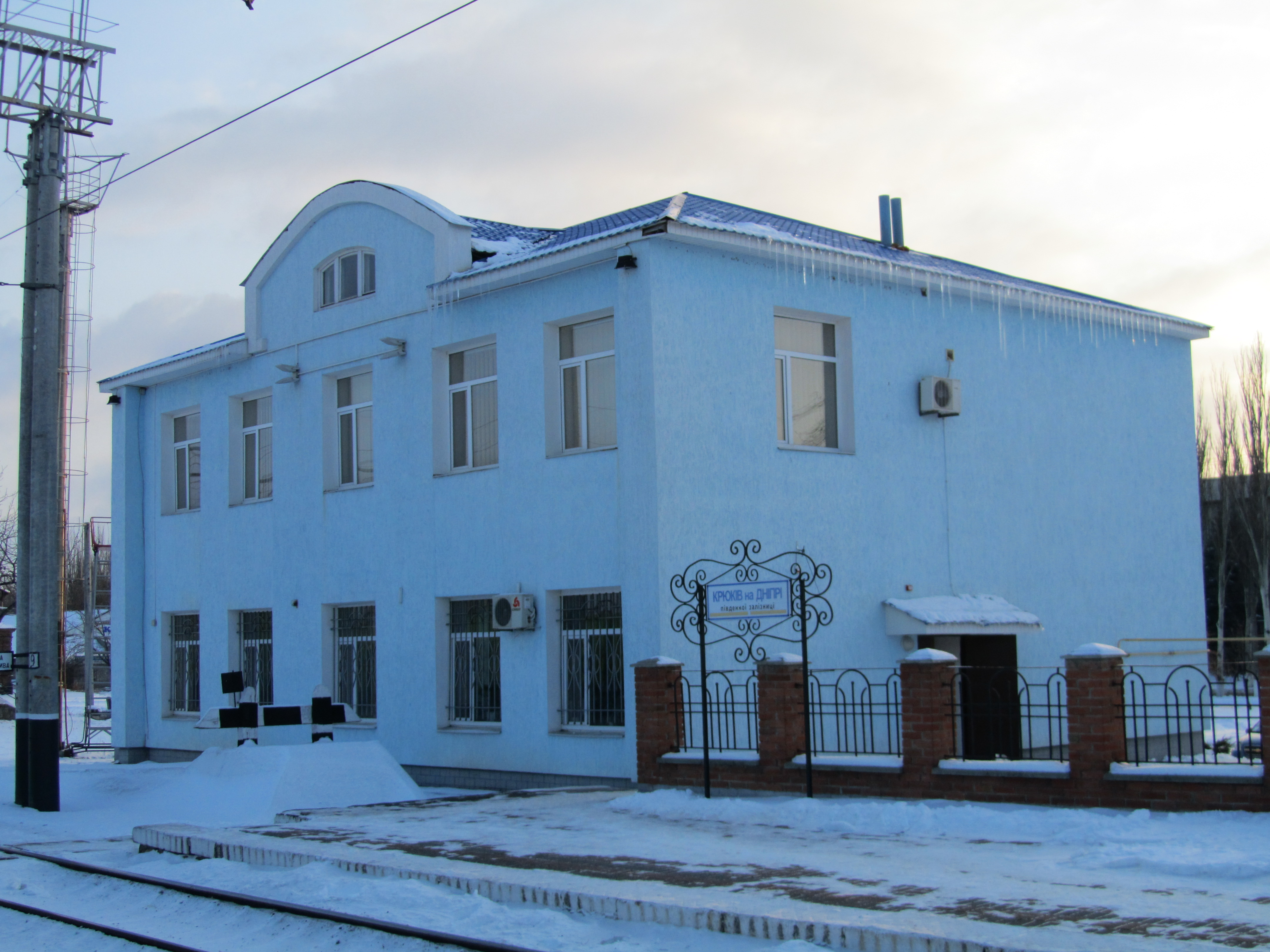 Одна з будівель на території Крюківського залізничного вокзалу